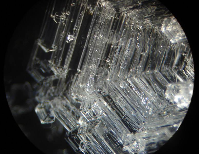 Cristaux de givre observés à la loupe binoculaire